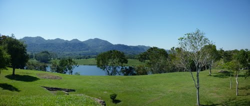 Zona circundante de la zona arqueológica